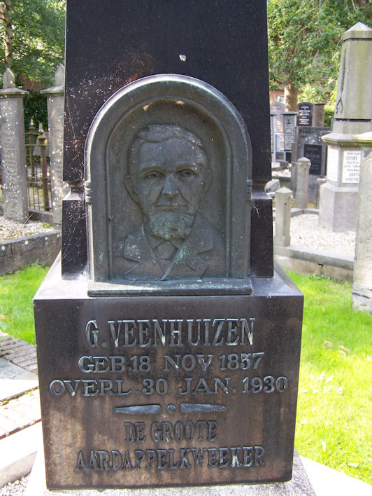 Detail grafmonument Geert Veenhuizen bij de Koepelkerk in Sappemeer